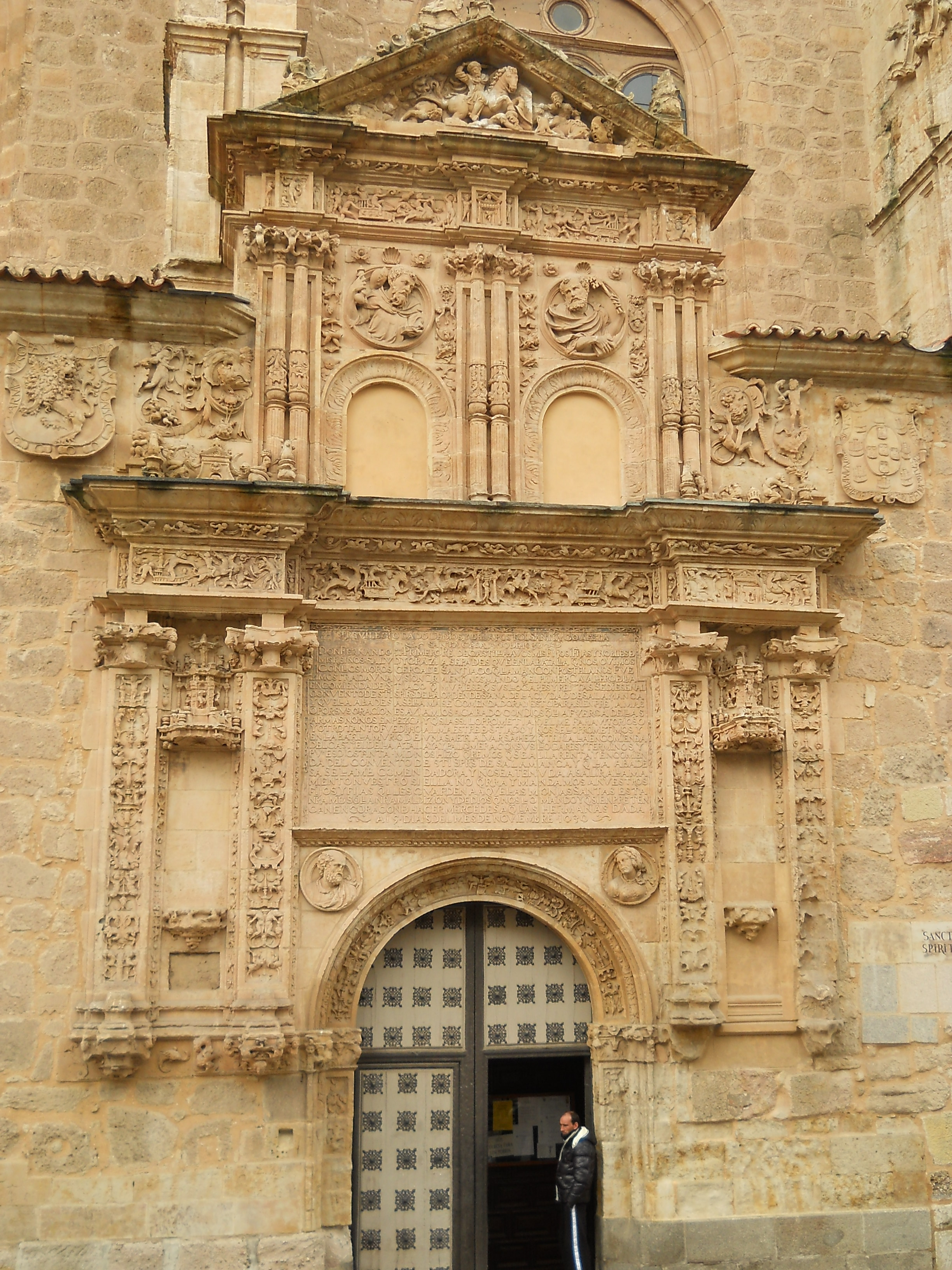 Portada, Iglesia de Sancti Spiritus, Salamanca, España